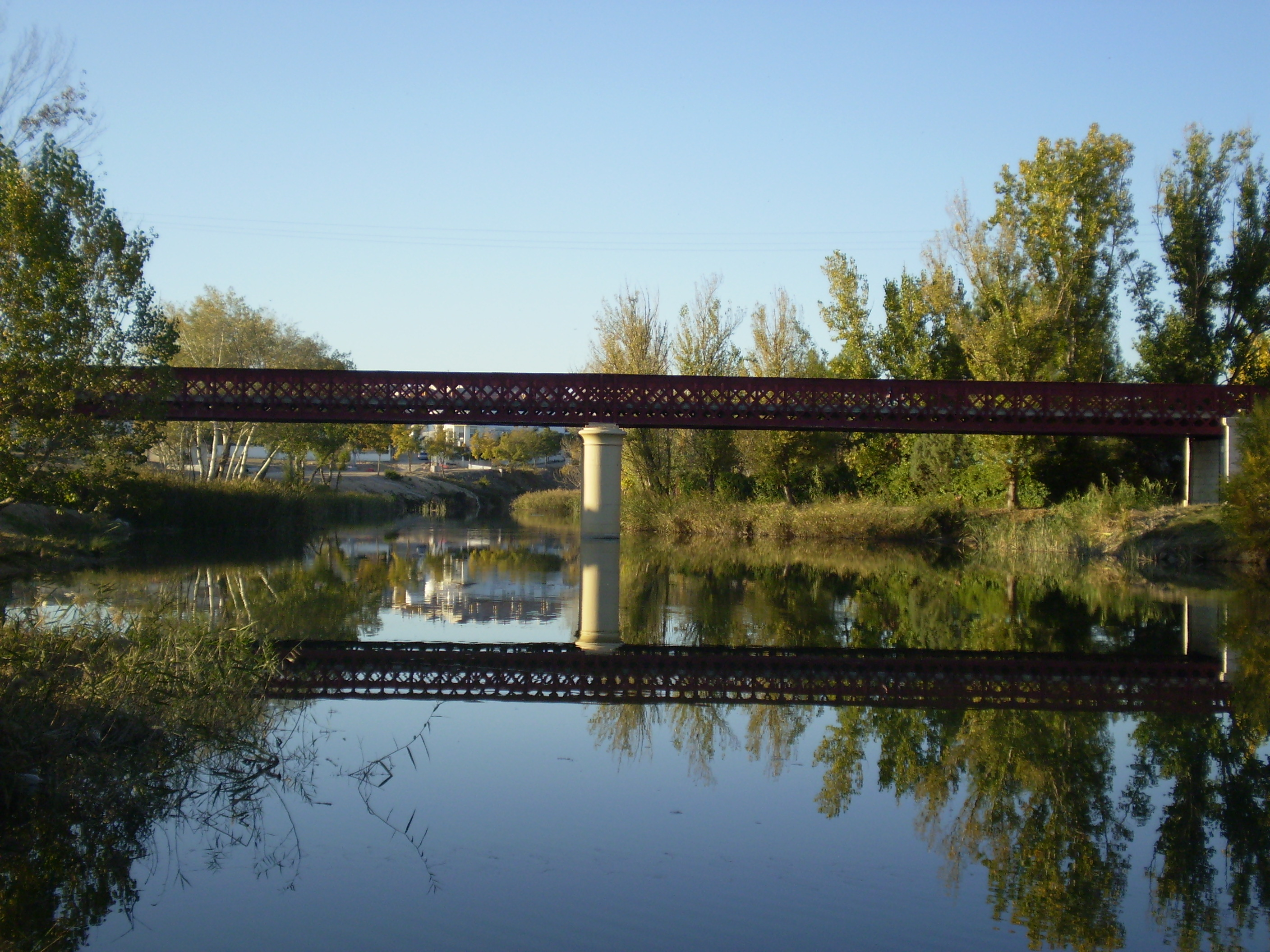 Fuentidueña de Tajo. Bridge over Tagus River. Madrid,Castilla.